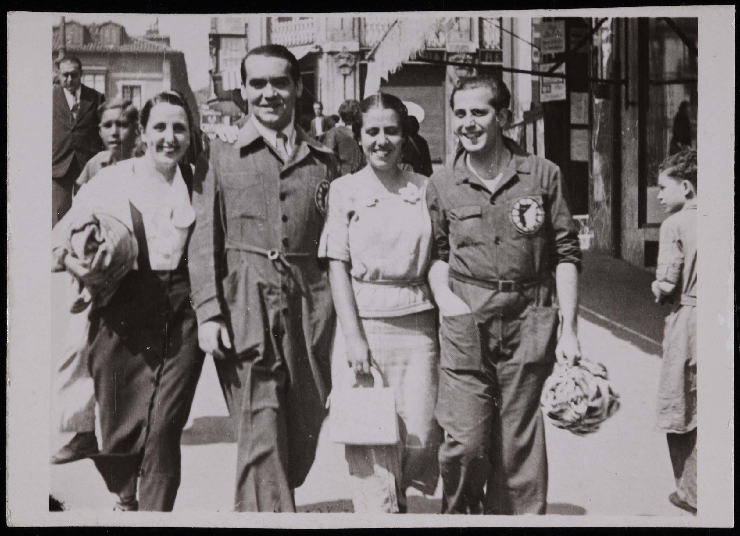 María del Carmen García Lasgoity, Federico García Lorca, Isabel García Lorca y Jacinto Higueras (Santander) (15 de agosto de 1933). Fotografía anónima. Colección del Museo Nacional Centro de Arte Reina Sofía, Madrid, España